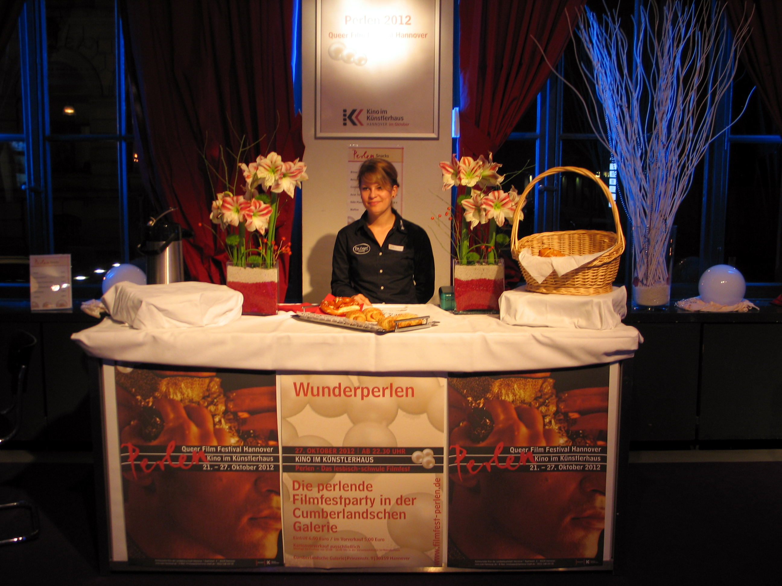 Fast ausverkauft: Die junge Bedienkraft im Kino im Künstlerhaus, kurz nach Beginn der Vorstellung des Dokumentarfilms Detlef - 60 Jahre schwul. Dafür kündet ein extra Plakat vom Kartenvorverkauf für ein besonderes Bonbon zum Abschluss des 16. Perlen - Queer Film Festivals Hannover: "Wunderperlen. Die perlende Filmfestparty in der Cumberlandschen Galerie am 27. Oktober 2012 in der Prinzenstraße 9 ...